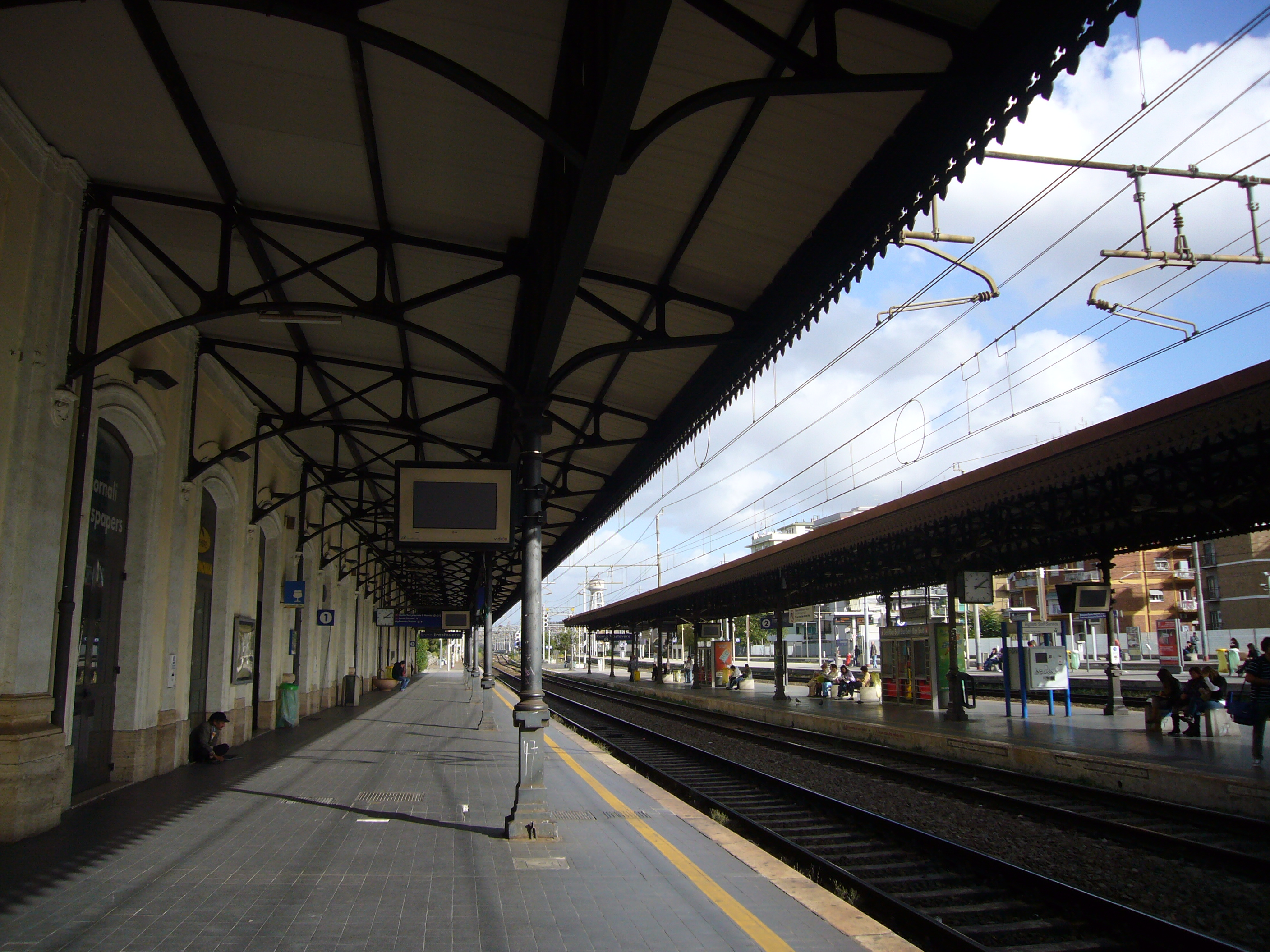 Roma, stazione di Trastevere, binario 1